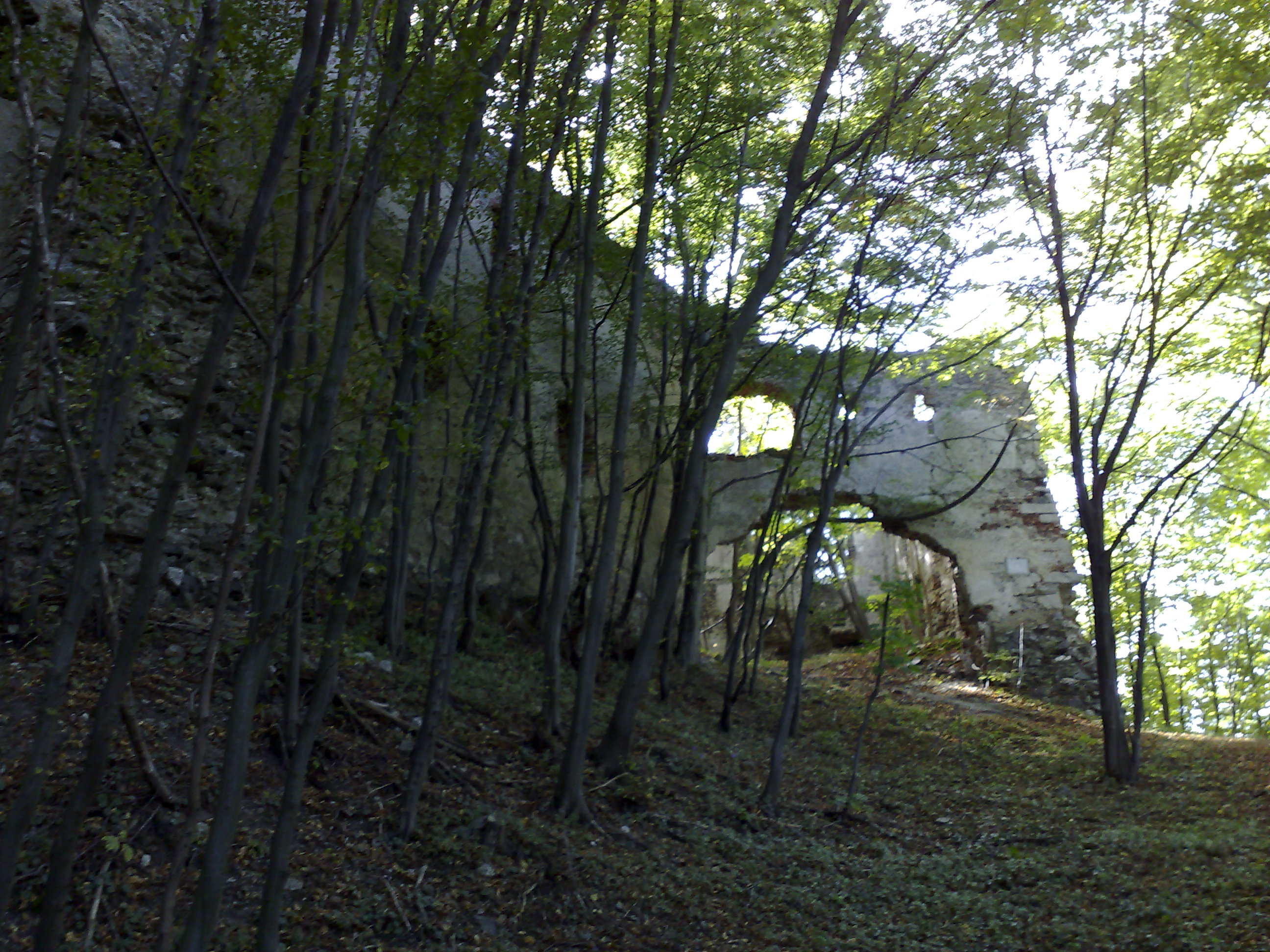 Die nord-östliche Seite der verfallen Burg Schwarzenbach in Niederösterreich